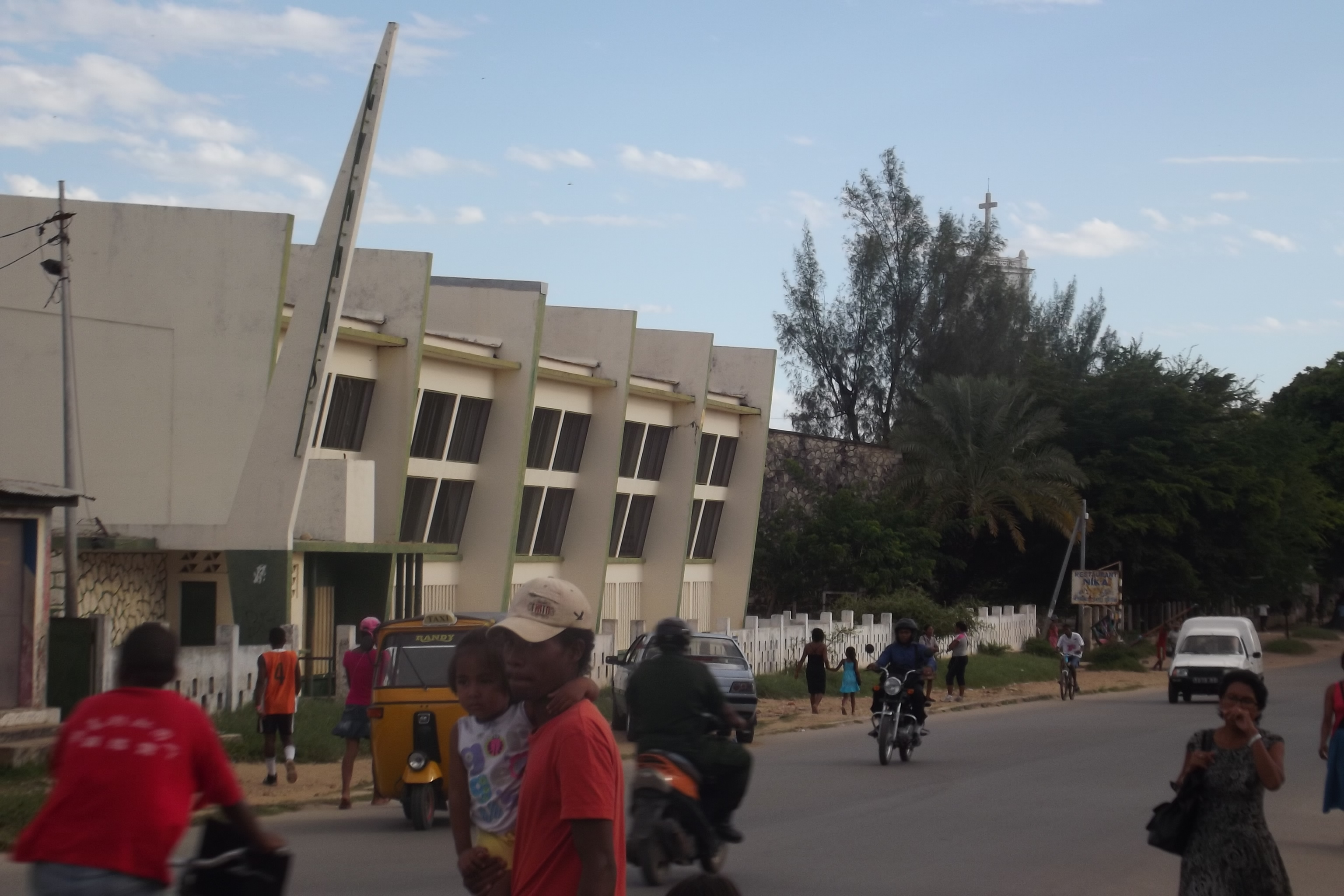 Gymnase construit en 1962